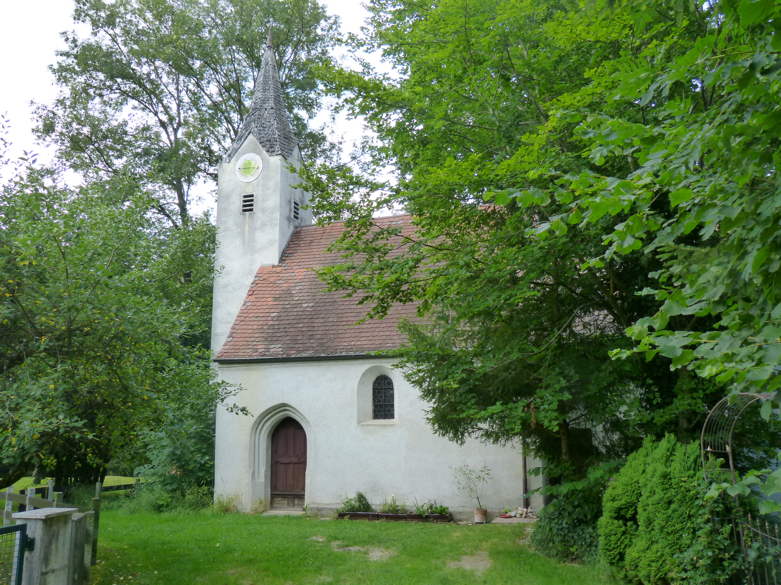 Schloss Zellerrait, Schlosskapelle St. Georg